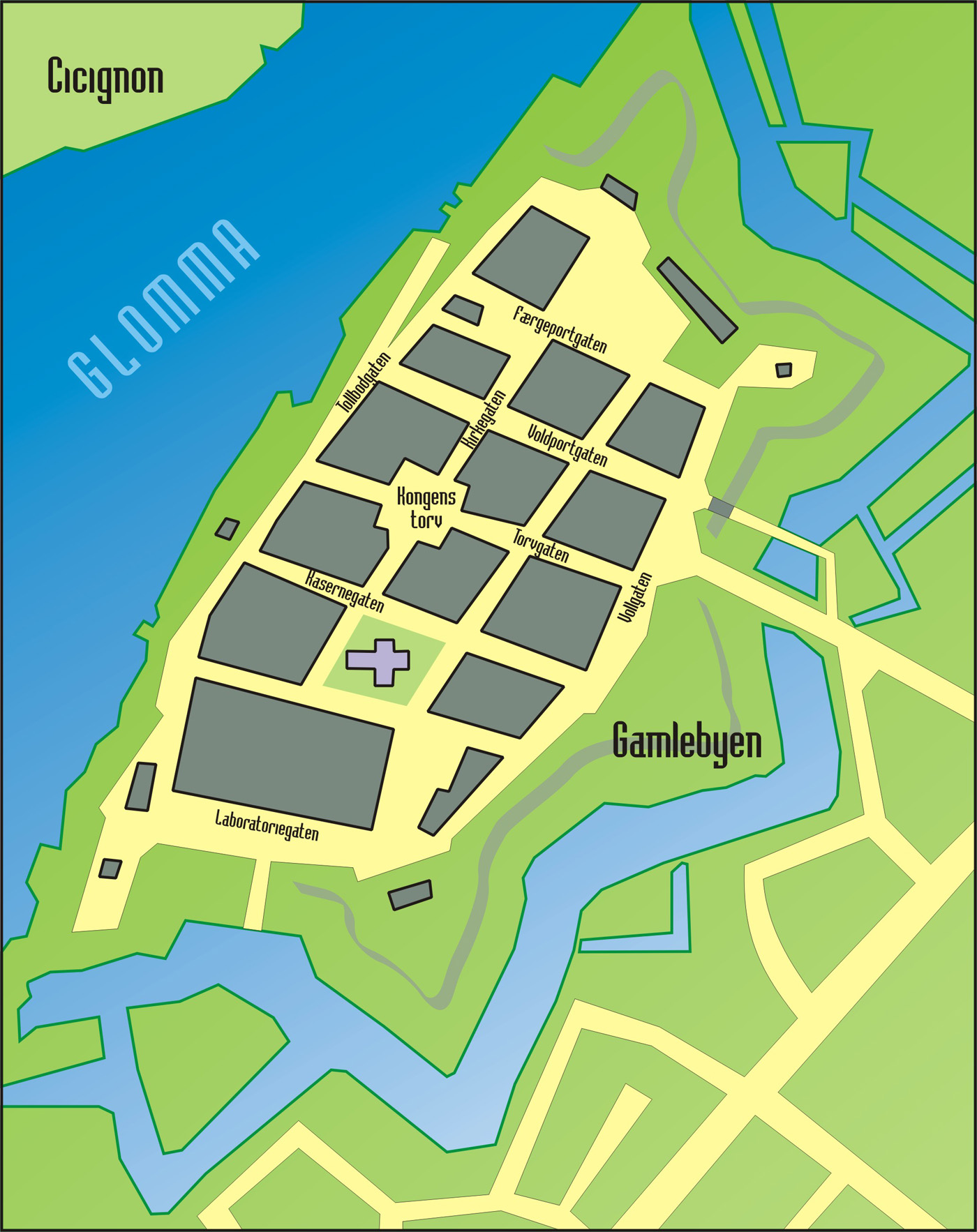 Kart over Gamlebyen i Fredrikstad.